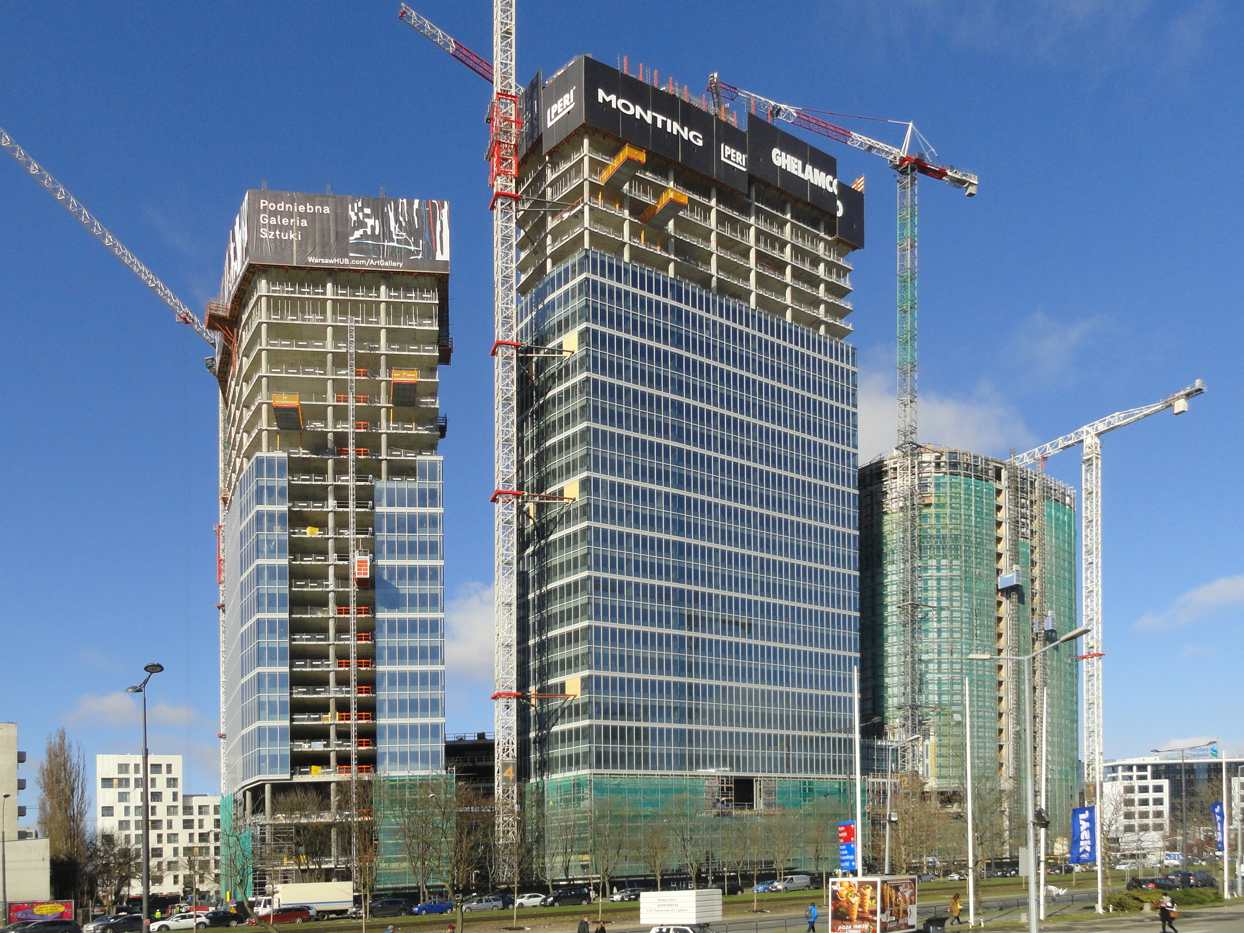 Budowa kompleksu The Warsaw Hub przy ulicy Towarowej w Warszawie.